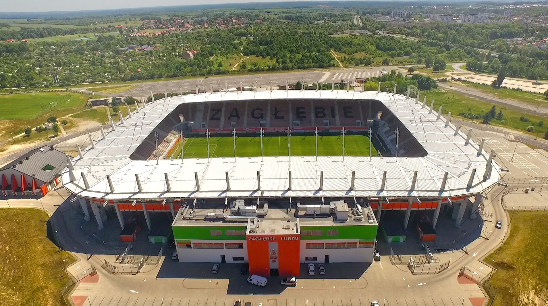 Widok stadionu Zagłębia Lubin. Zdjęcie wykonane przez FlyRecord.pl z lotu ptaka przy wykorzystaniu drona.